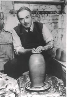 le céramiste Roger Guérin (Jumet, 1896 - Bouffioulx, 1954)